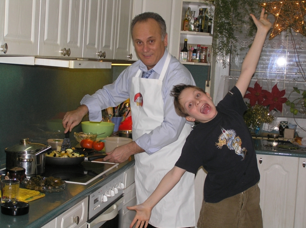 TheofilosVafidis, grecko-polski gastronom i osobowość telewizyjna.